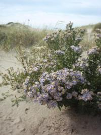 Voorbeeld van kleurverzadiging.